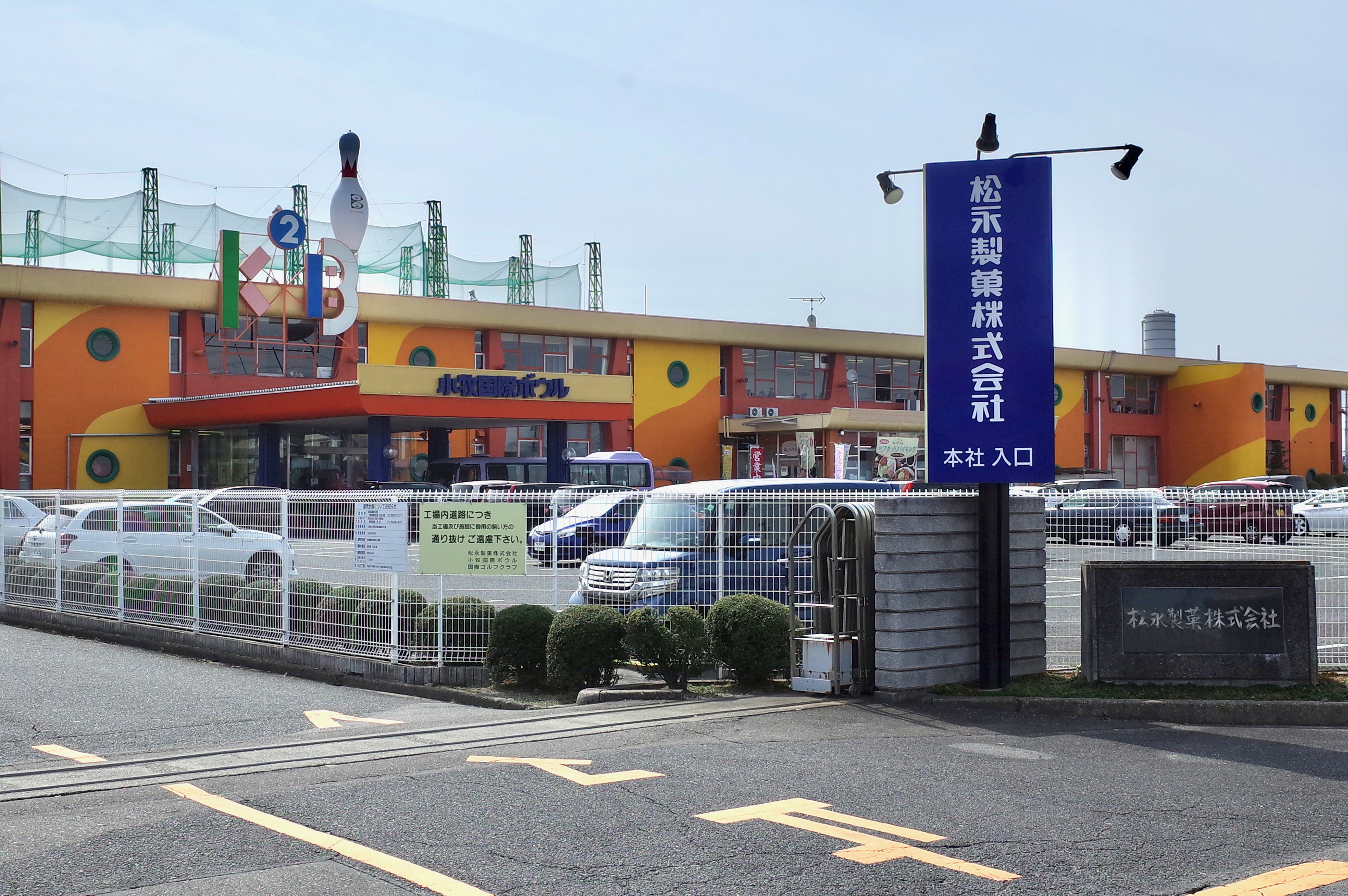 愛知県小牧市にあるボウリング場、小牧国際ボウル敷地は運営会社松永製菓の本社工場敷地に隣接する